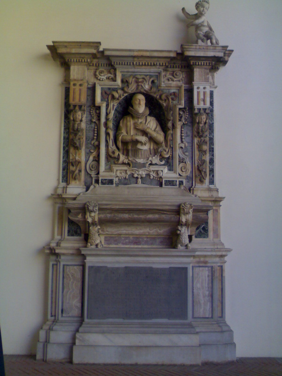 chiesa di sant'anna dei lombardi (napoli)